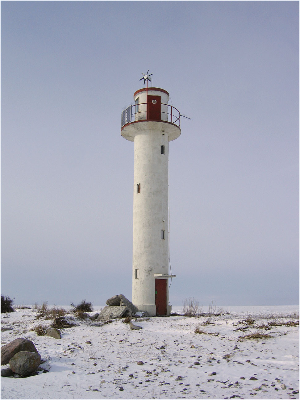 Pöörilaiu tulepaak